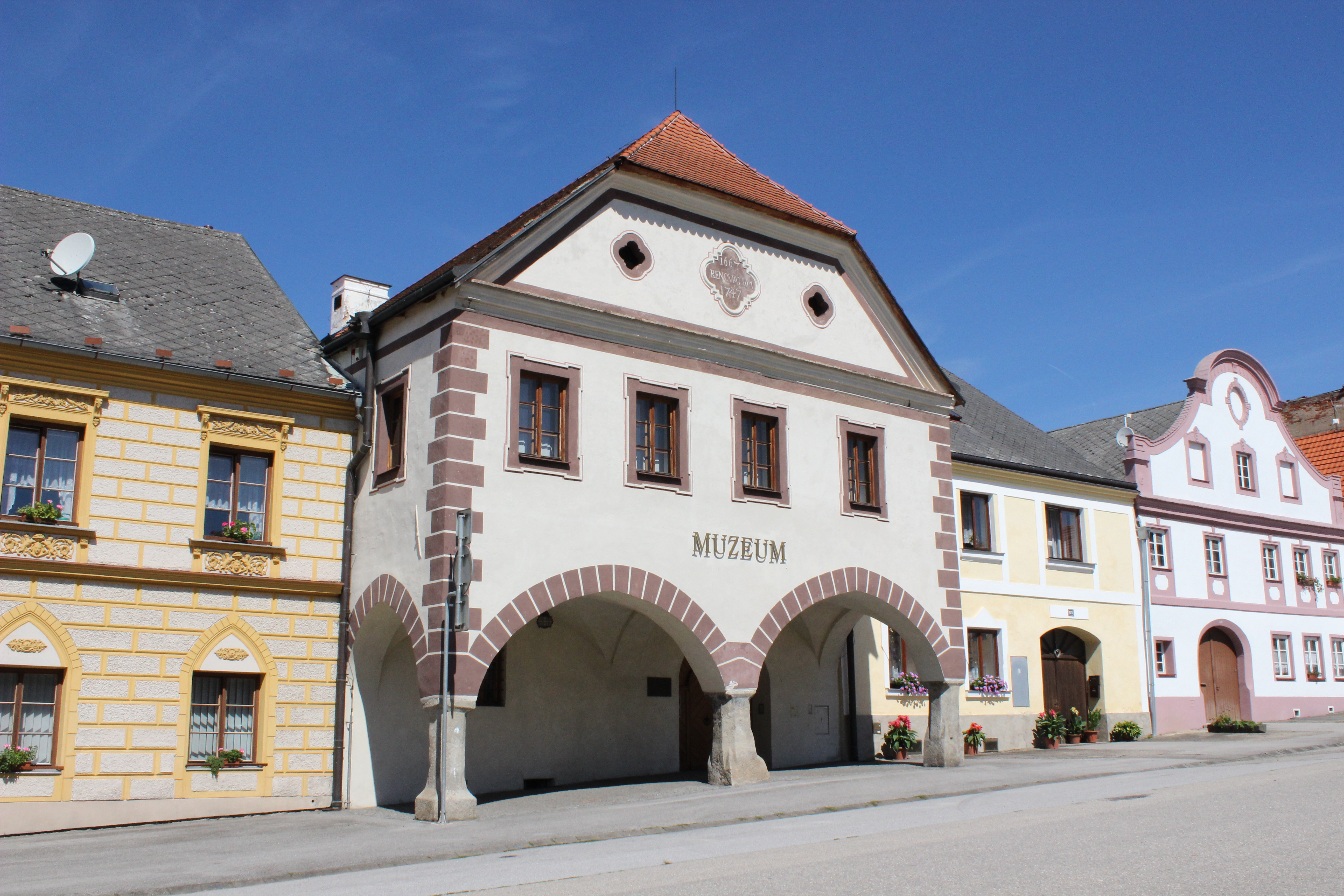 Budova muzea na chvalšinském náměstí.